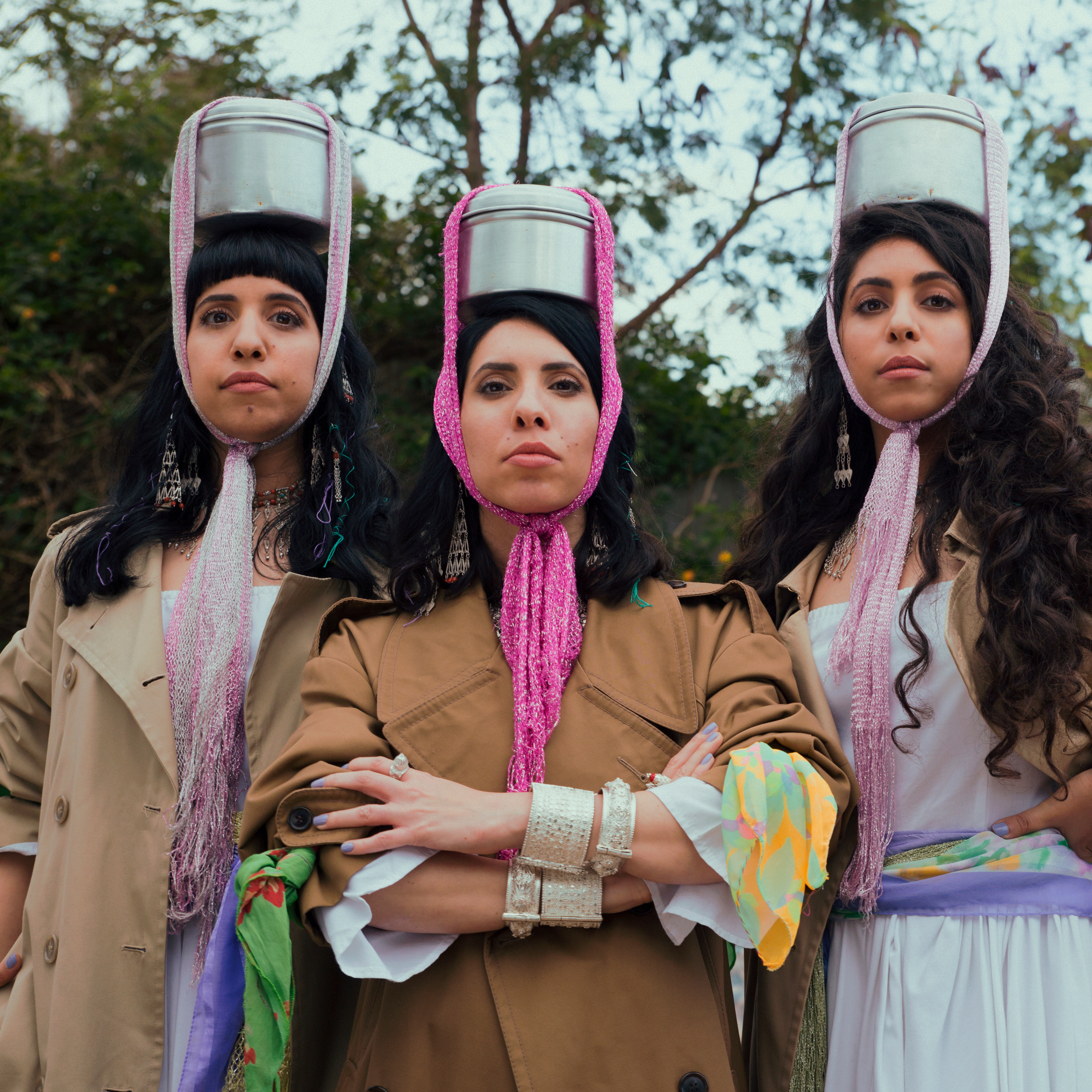 חברות הרכב A-WA לבושות בסגנון היפ־הופ צבעוני, בחאקי ובגלביות ולהן סיר קשור על הראש (כמנהג מסורתי בתימן). הסיר מופיע בקליפ כאביזר אופנתי עם פן של מחאה.